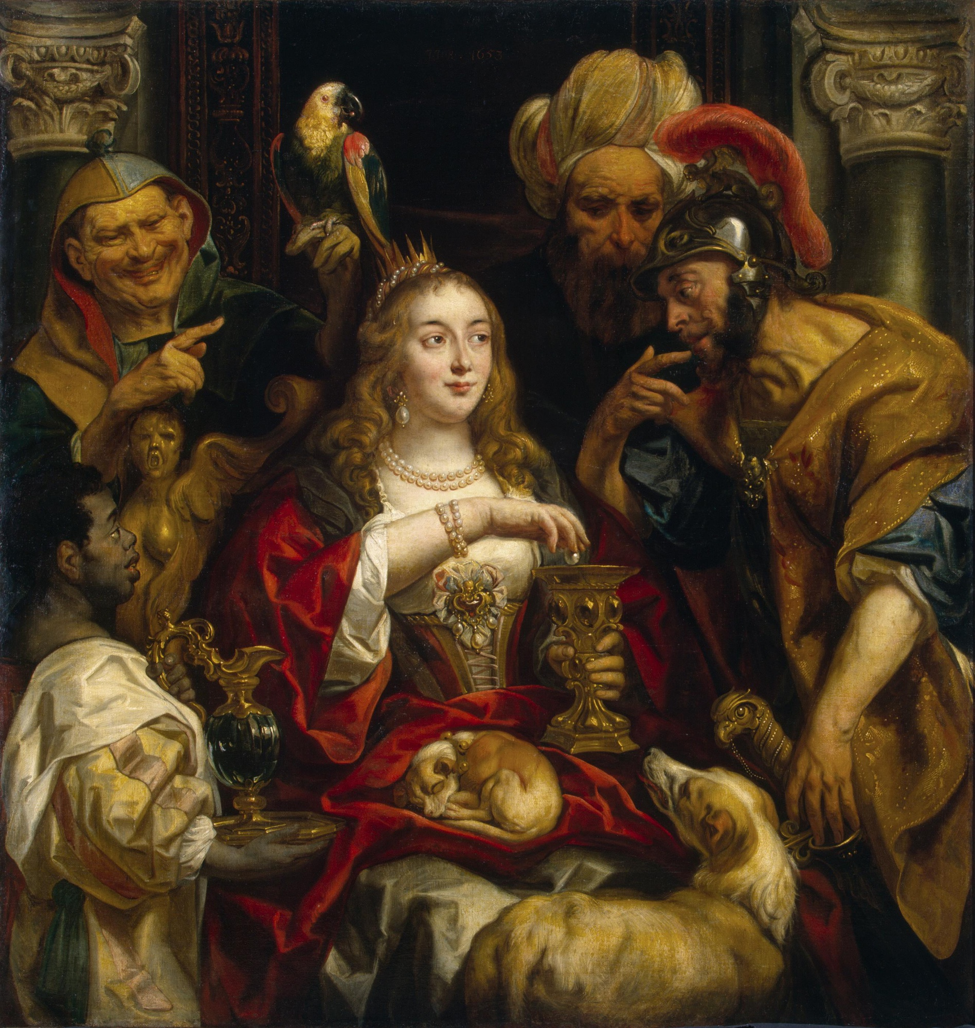 Het Feestmaal van Cleopatra van Jacob Jordaen, 1653, verf op doek, 156,4 x 149,3 cm.